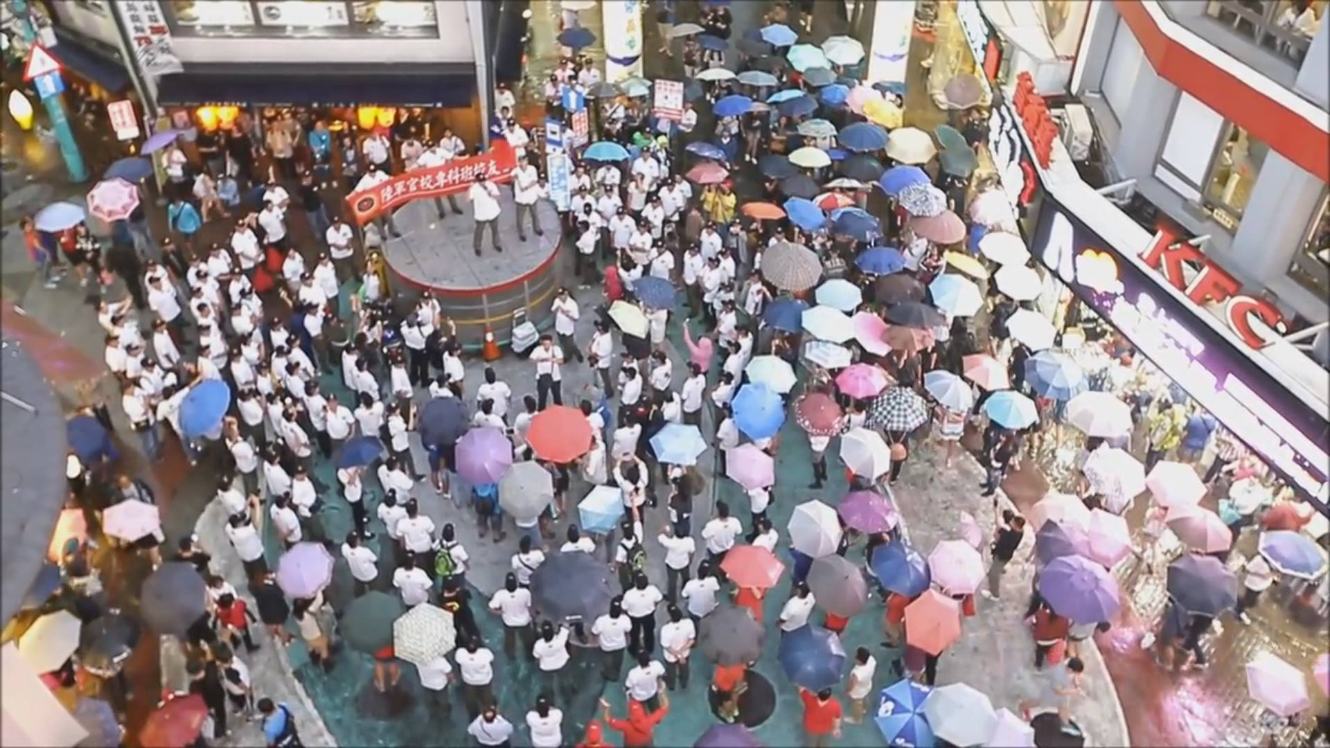 我愛國旗嘉年華-陸軍官校專科班校友會西門町國慶快閃